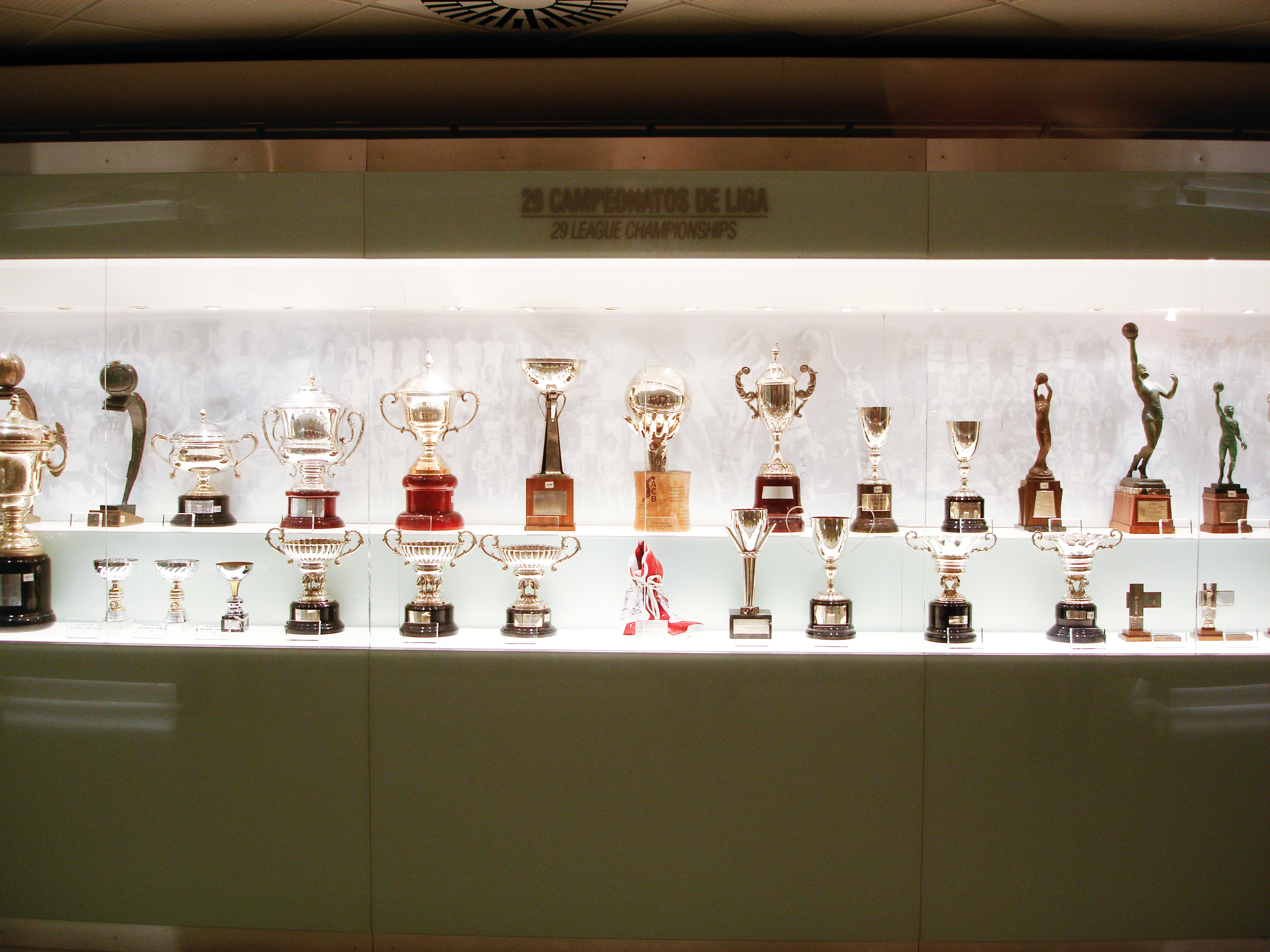 Basketball Trophies